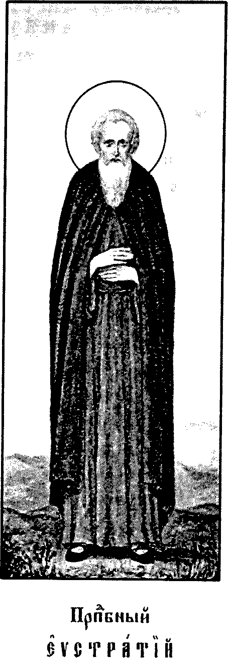 Иллюстрации к книге: Жития святых на русском языке, изложенные по руководству Четьих-Миней с дополнениями, объяснительными примечаниями и изображениями святых